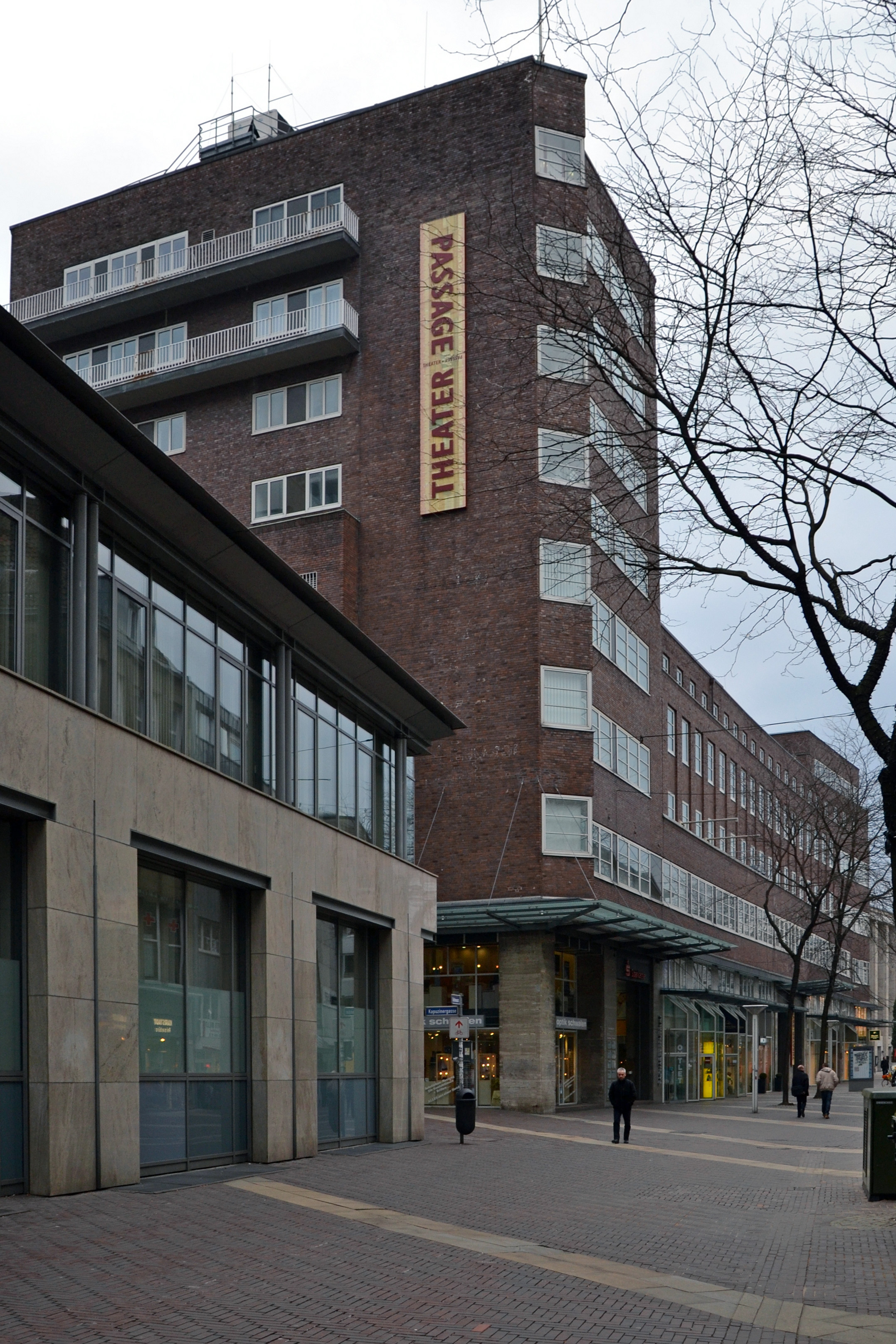 Ehemaliges Sparkassengebäude im Essener Stadtkern - Architekt: Georg Metzendorf